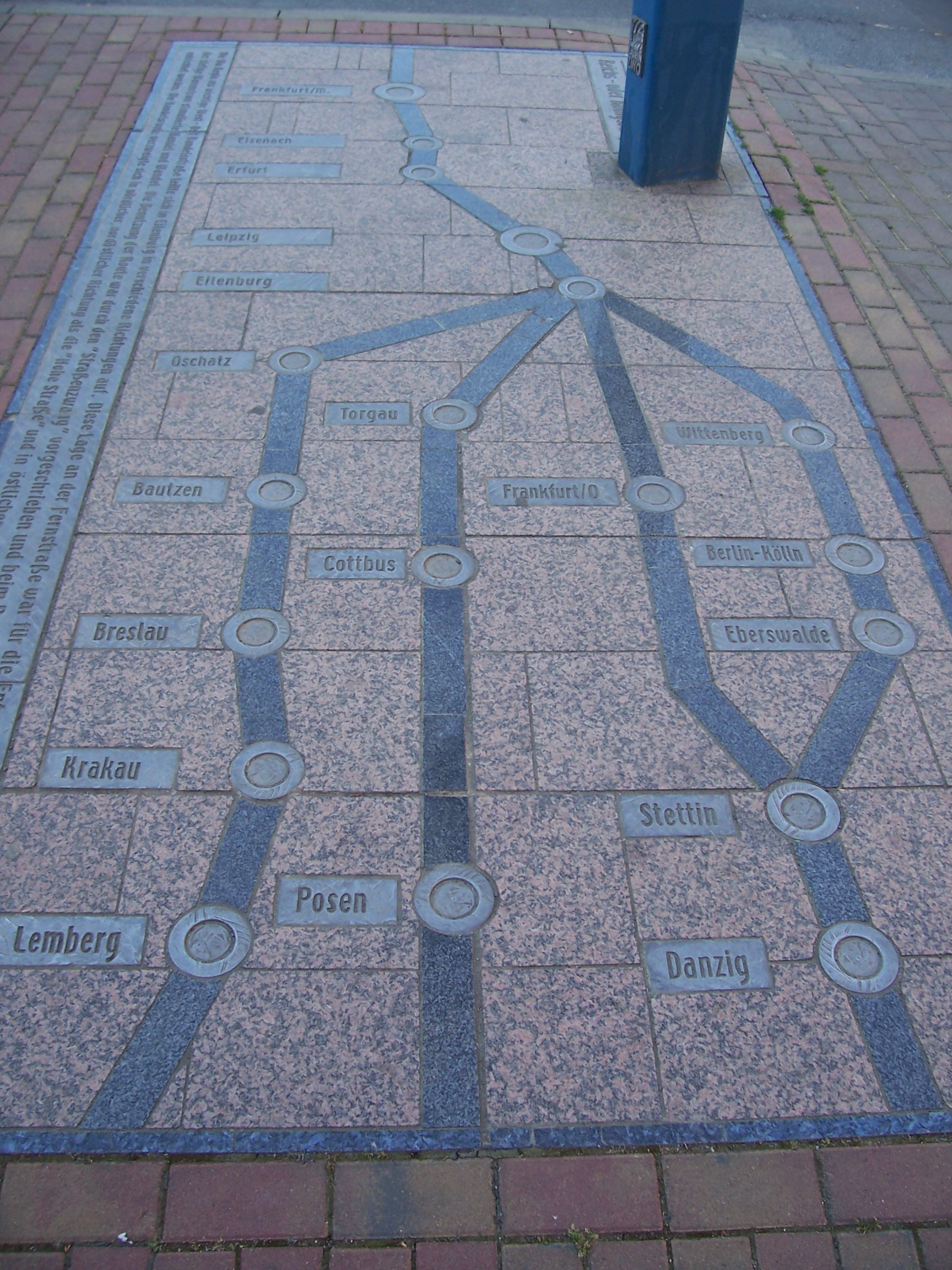 Gepflasterte grobe Übersichtskarte zum Verlauf der Via Regia in Eilenburg